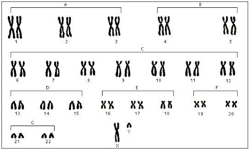 Les 23 paires de chromosomes humains, ce qui fait 46 chromosomes